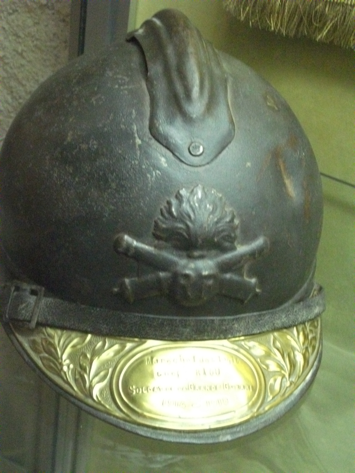 Csque Adrien de Monsieur Raou, présentation au musée du fort de la Pompelle, Reims.